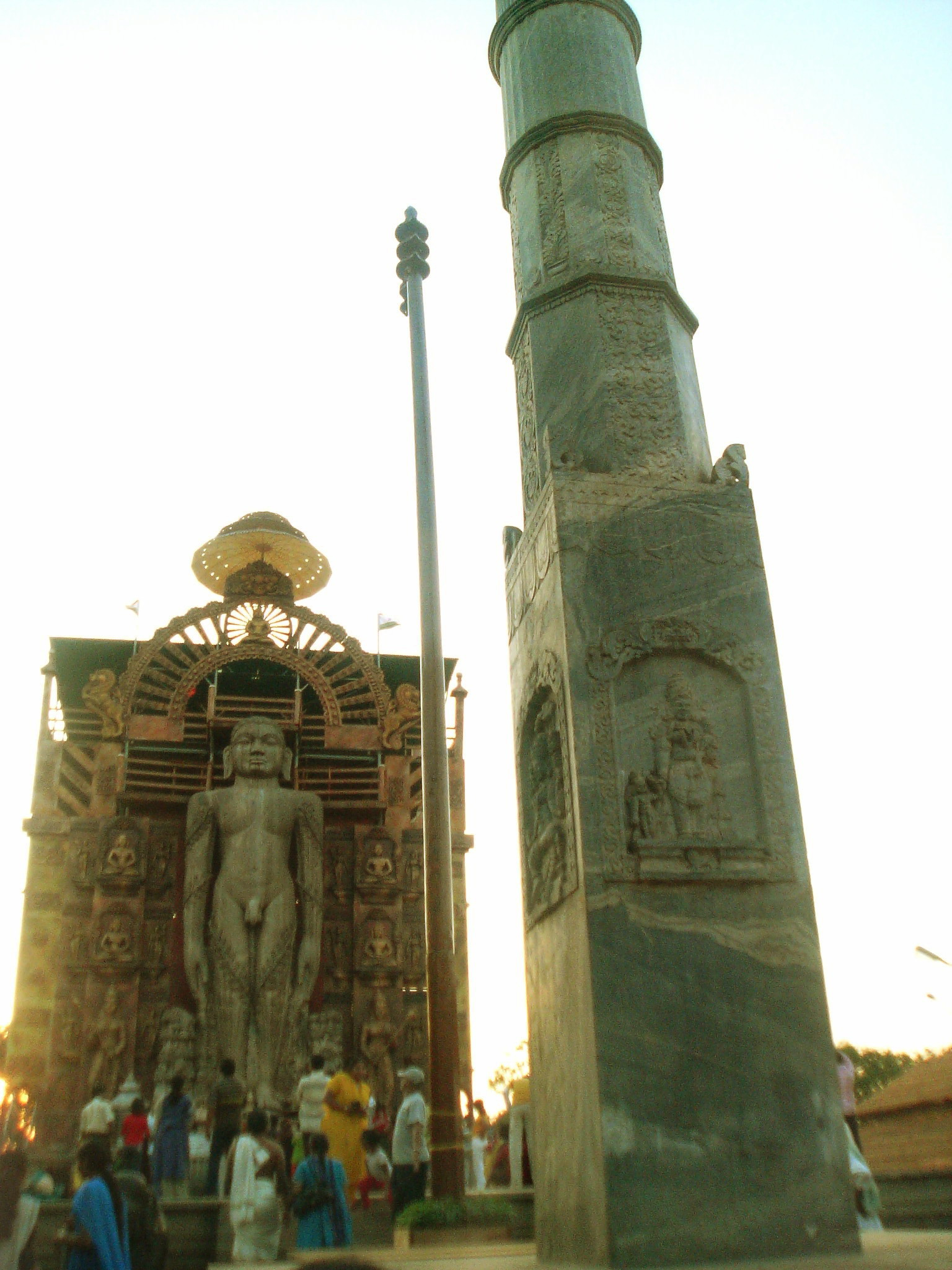 At Dharmasthala, Mangalore